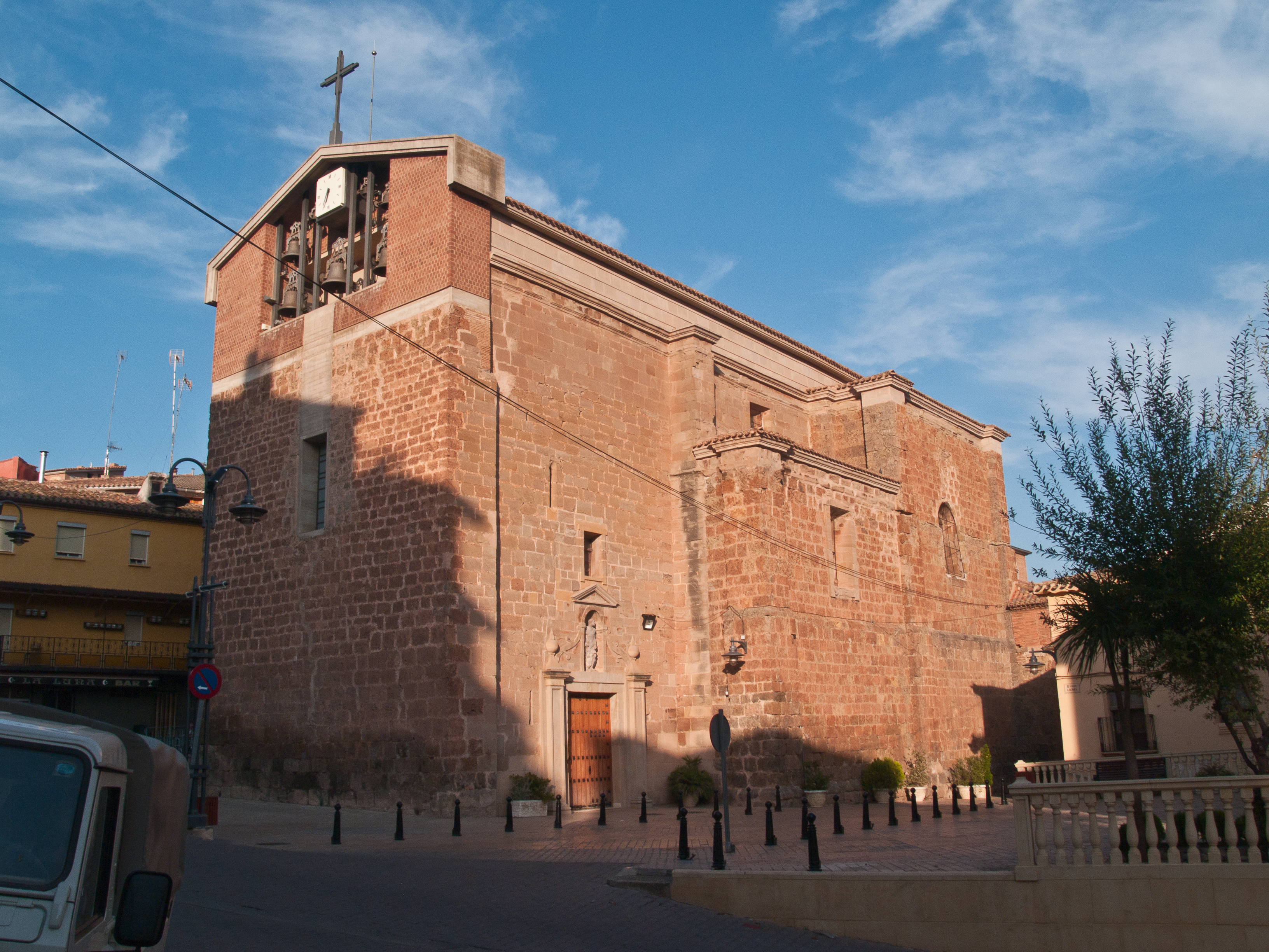 BIC: RI-51-0005038